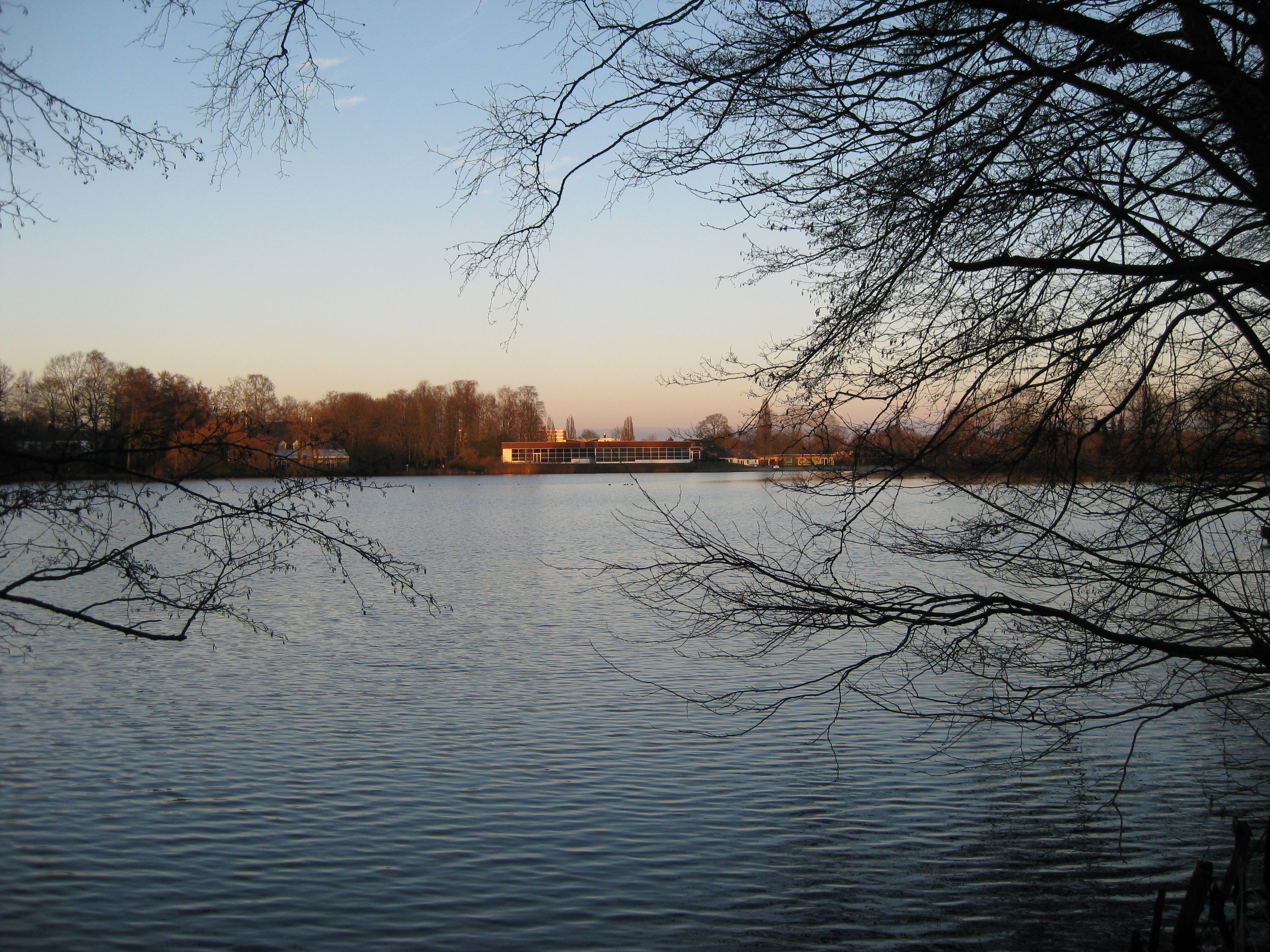 Rantzauer See